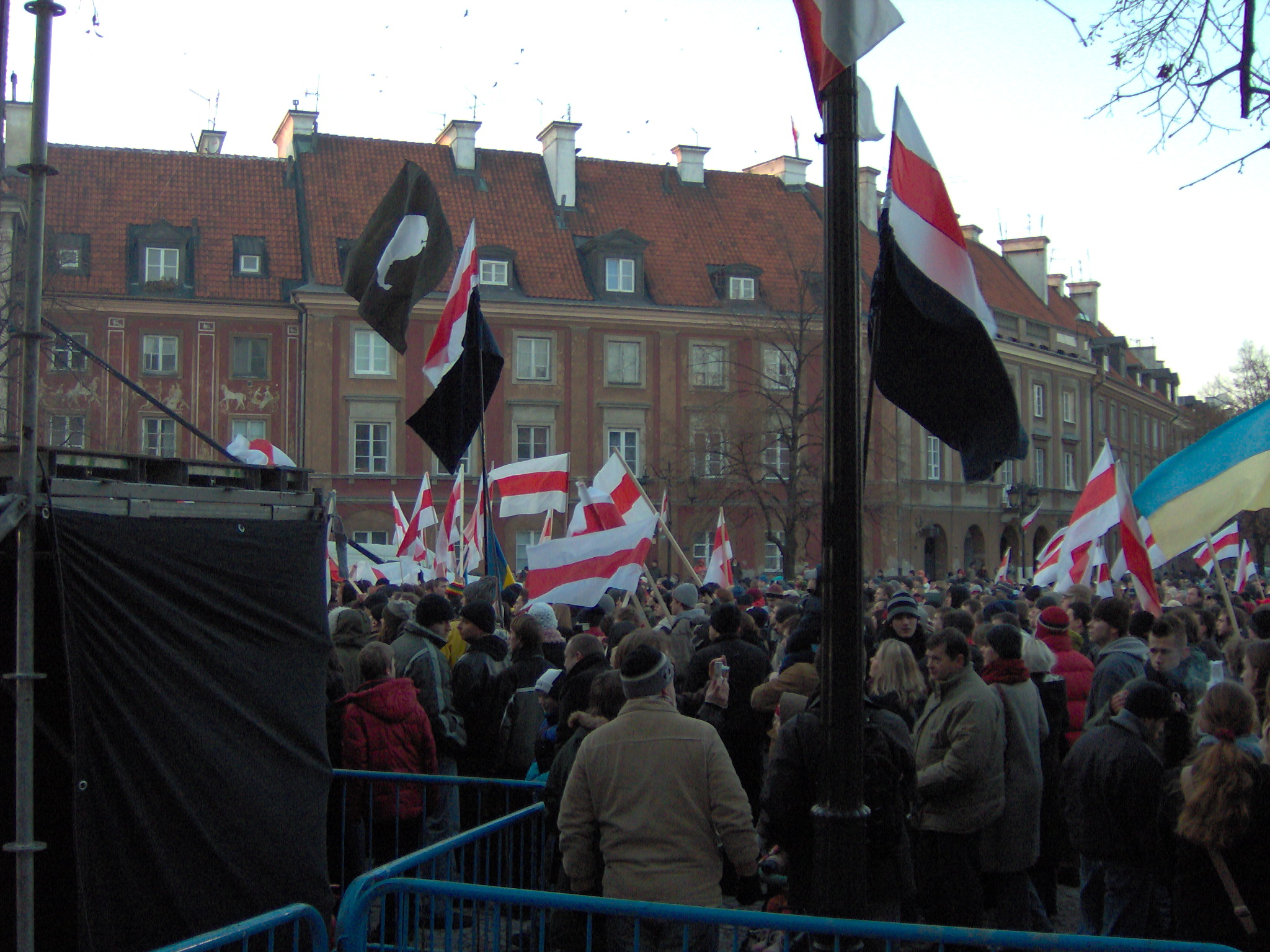 Koncert "Solidarni z Białorusią" 12 marca 2006 roku na Rynku Nowego Miasta w Warszawie.